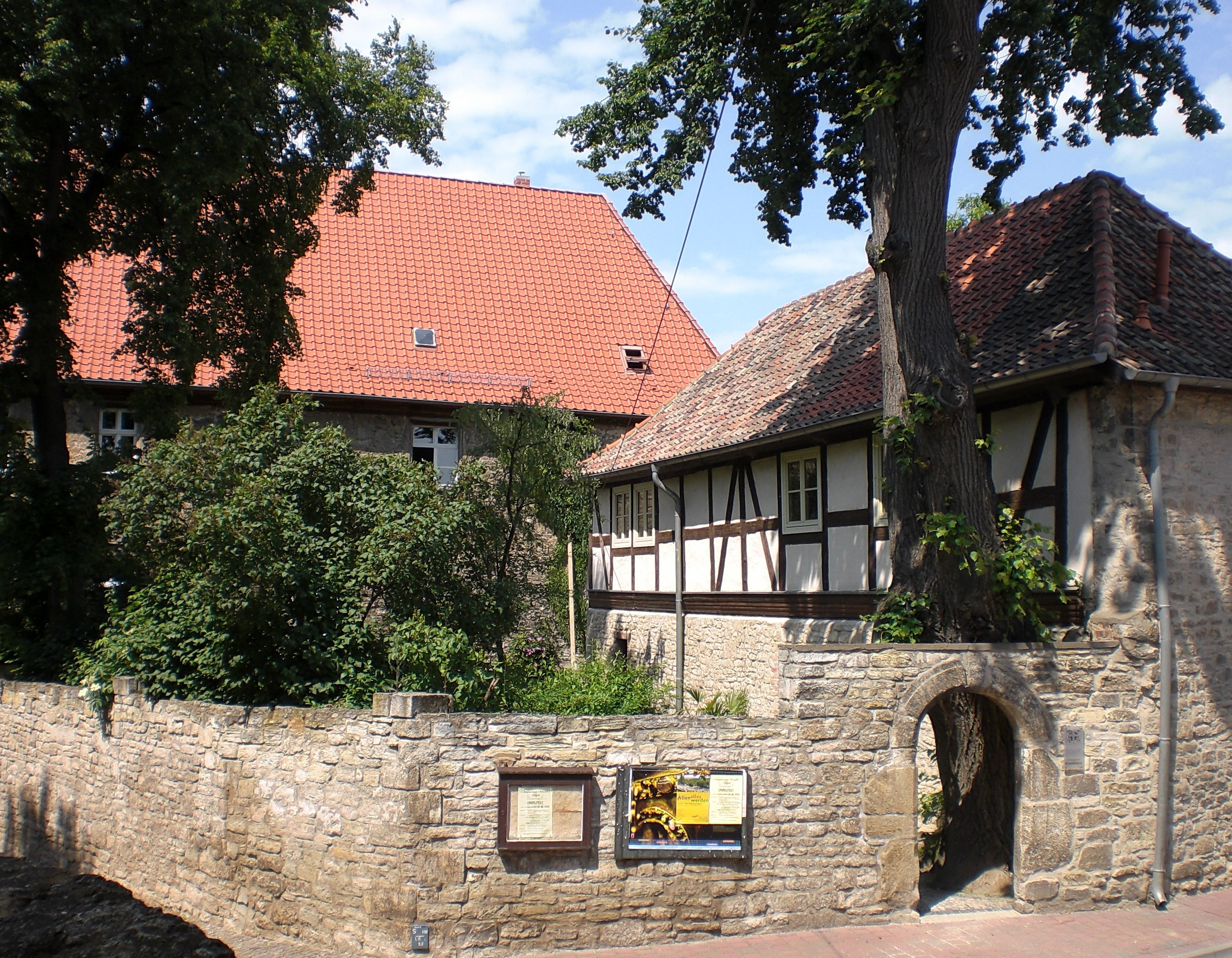 Pfarrhof der Martinkirche in Kroppenstedt